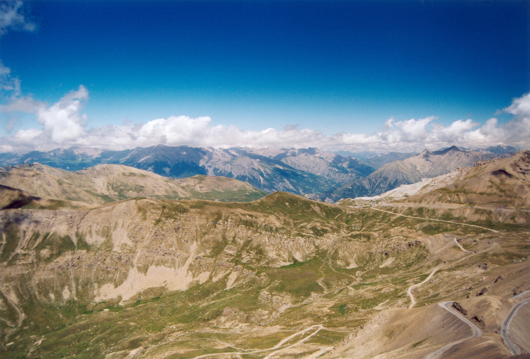 Col de la Bonnette Auteur : GIRAUD Patrick